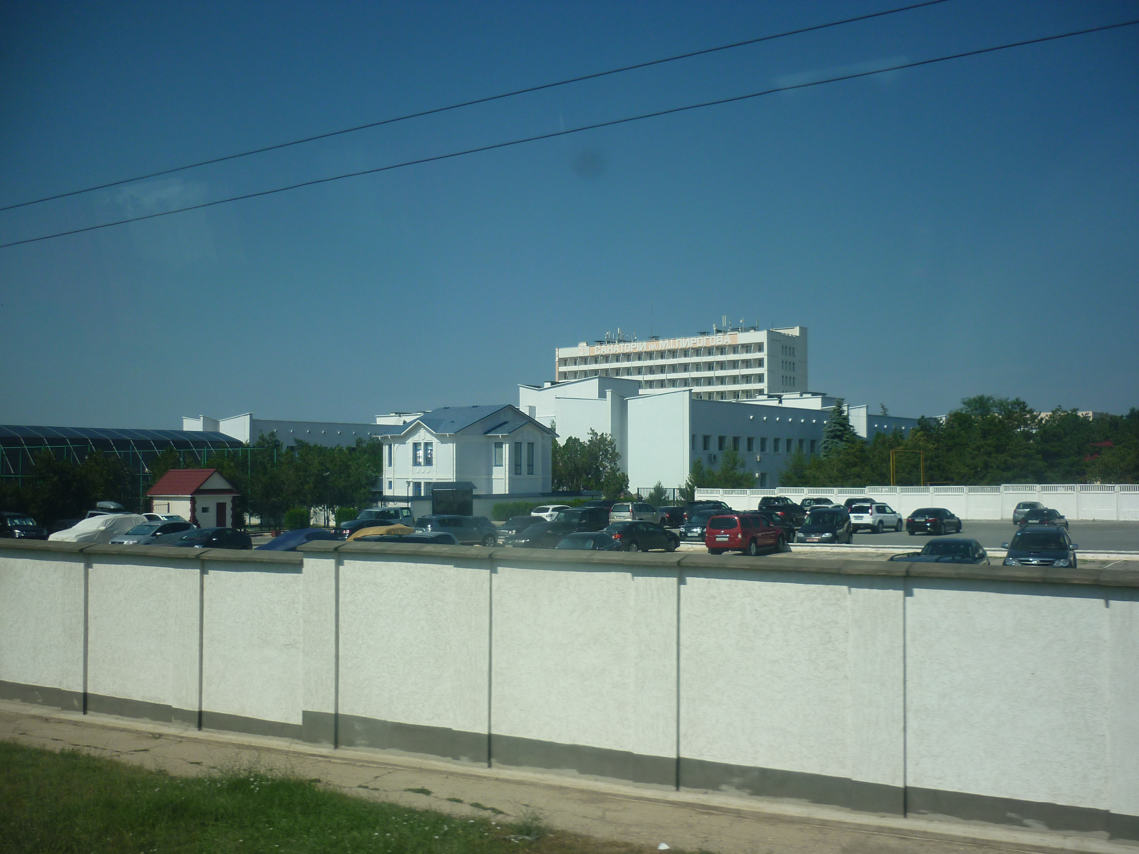 Віськовий санаторій в місті Саки АР Крим